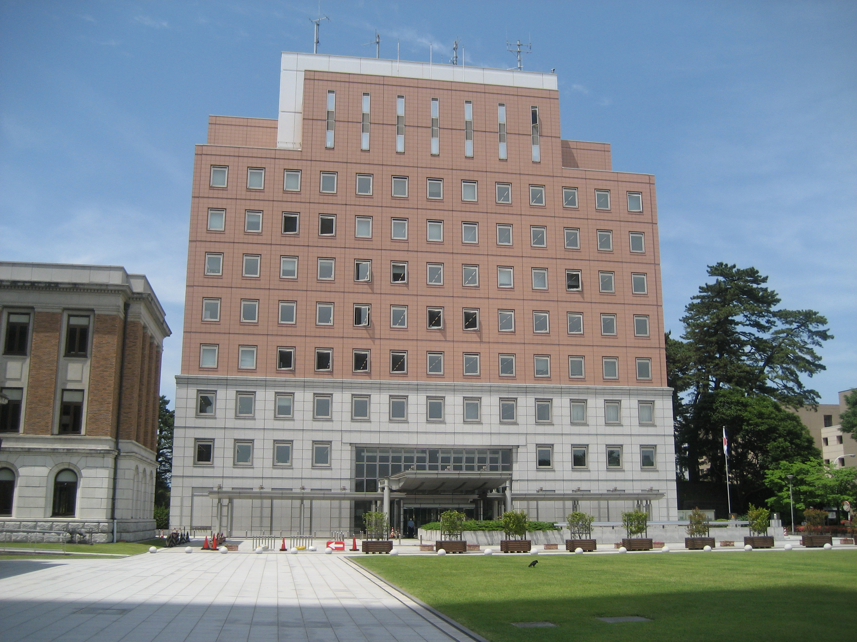 群馬県警察本部庁舎